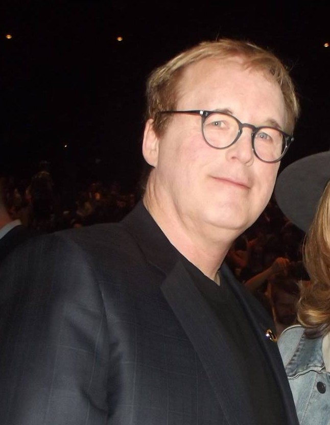 Brad Bird au festival international du film d'animation d'Annecy 2018.